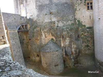 Casemate basse (de l'espagnol: "casa" et "matar" traduit casemate "maison pour tuer"). Dans ce cas, il s'agit plus précisément d'un "moineau", chargé de battre le fossé.